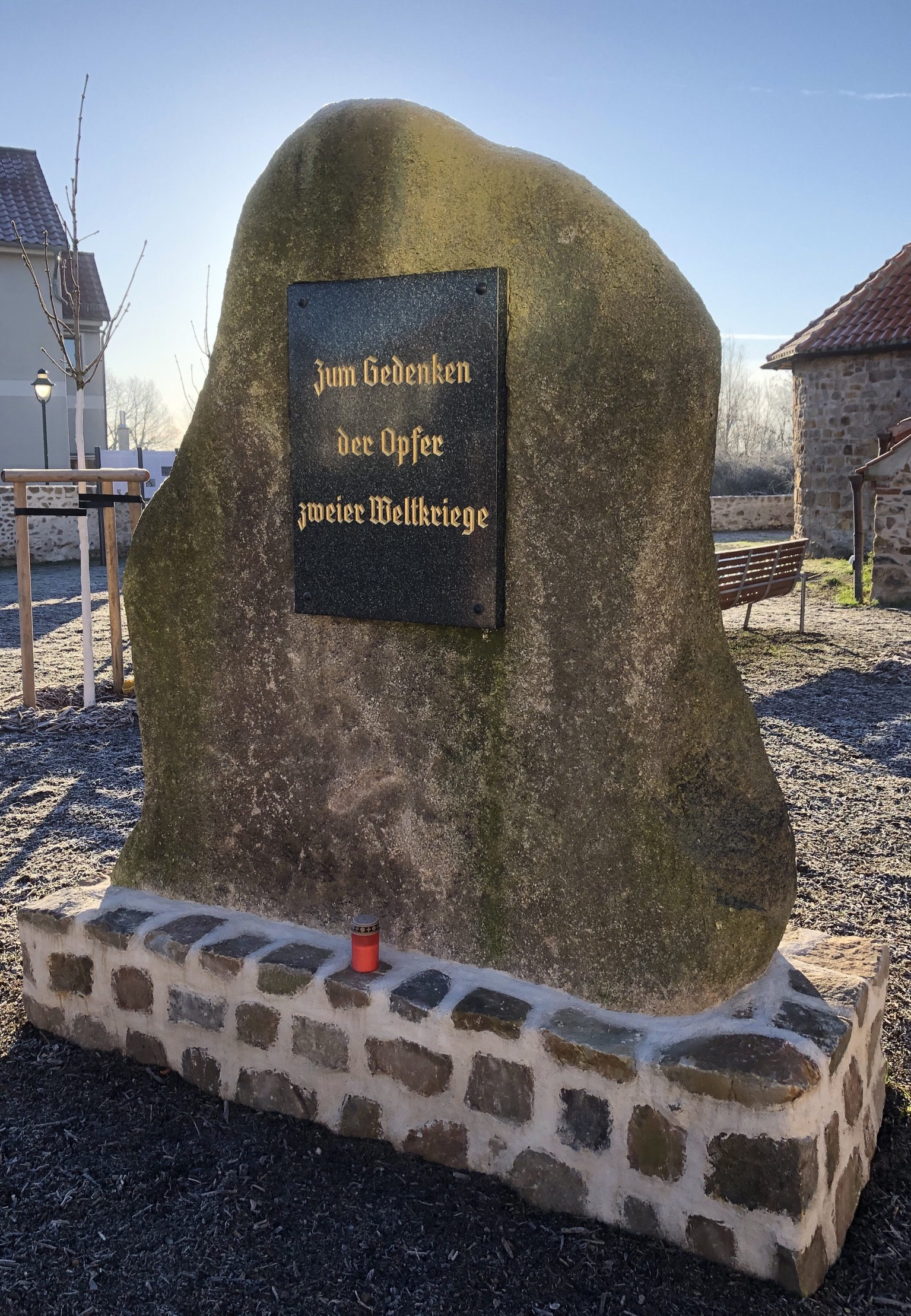 Kriegerdenkmal Dorfstraße in Gübs